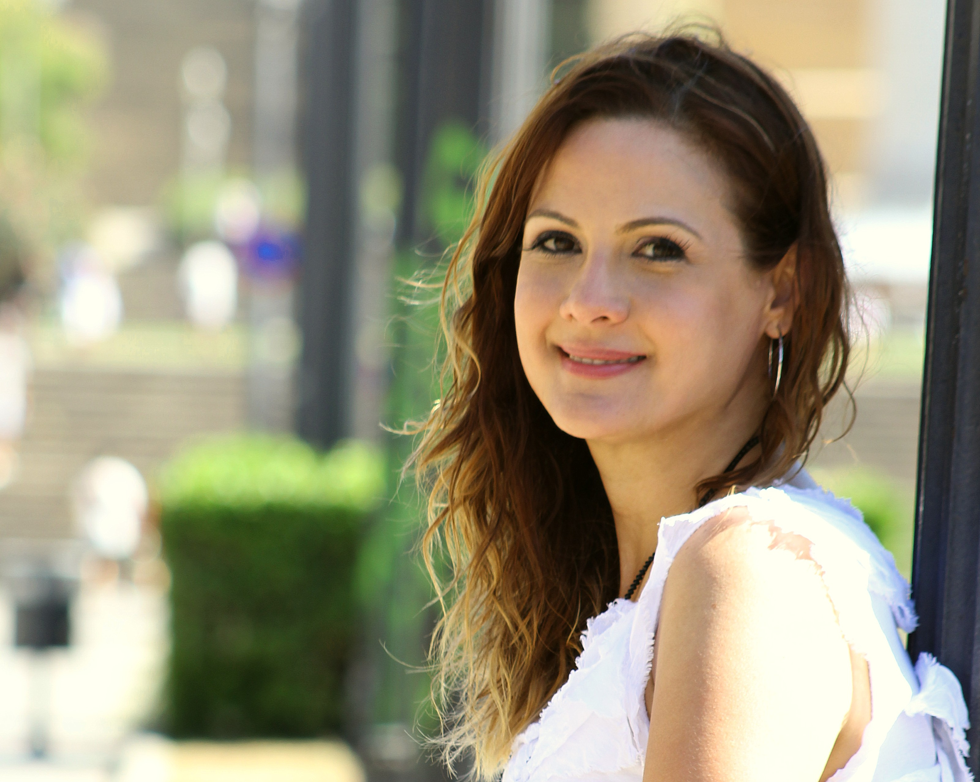 Fotografia